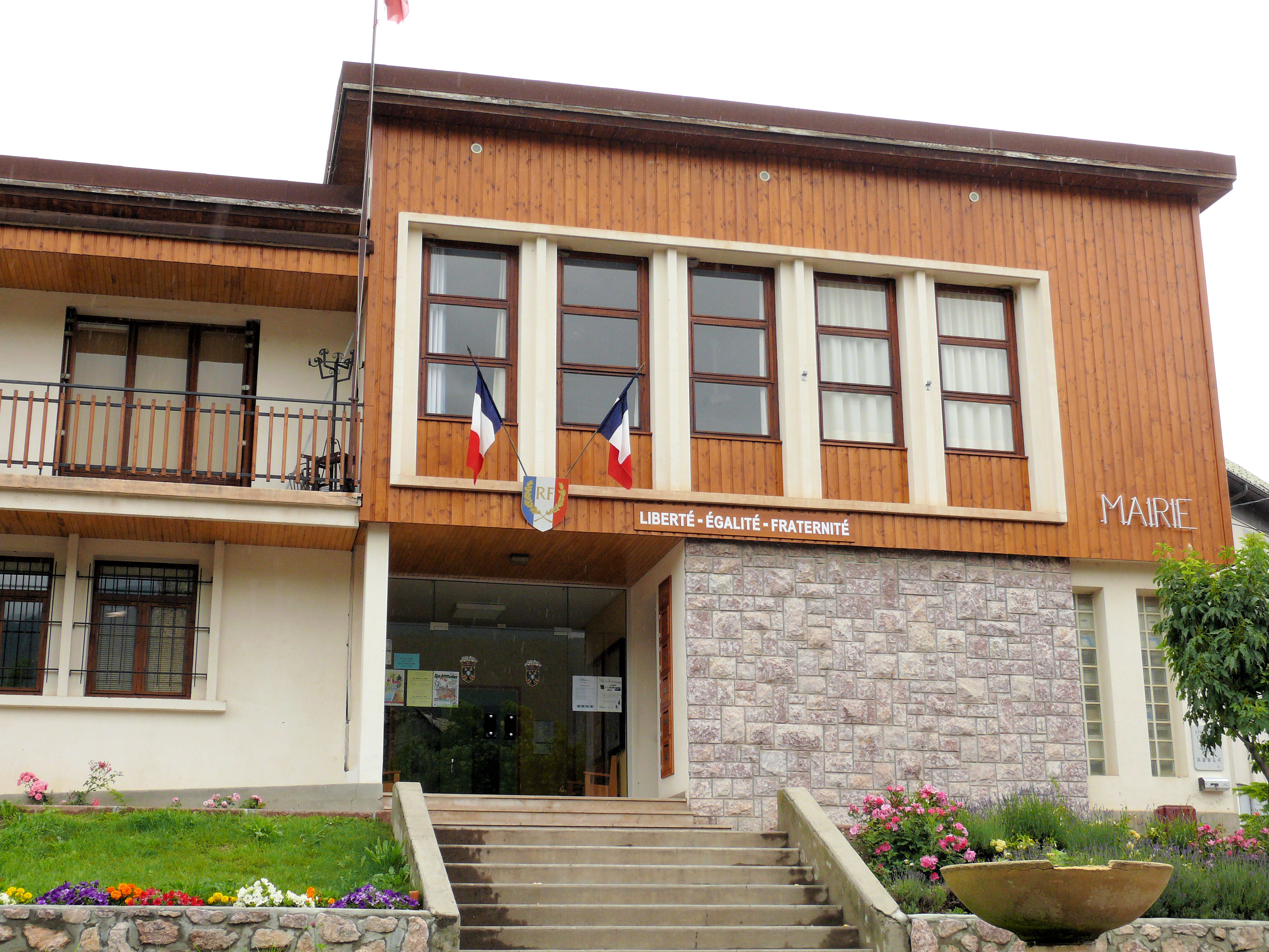 Guillestre - Mairie